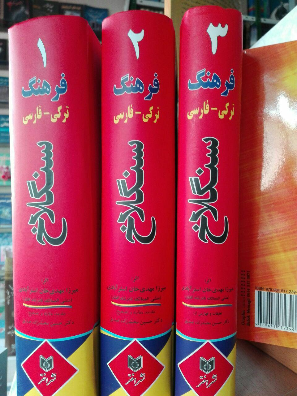 Mirza Məhdixan Əstərabadinin türkçə-farsça geniş sözlügüdür